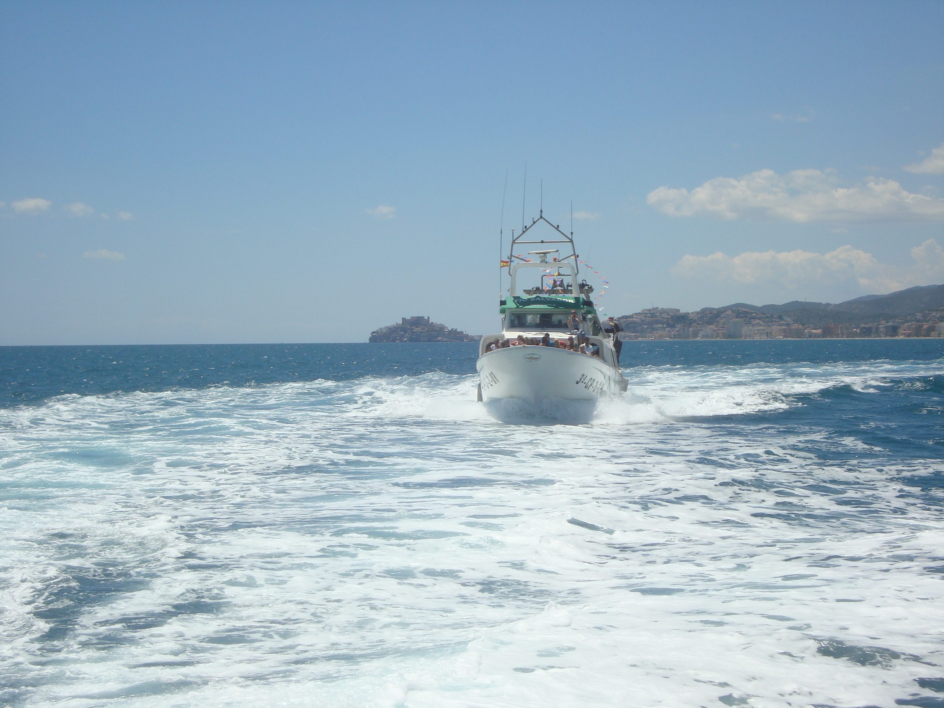 Vaixell de pesca navegant front a la costa de Peñiscola i Benicarló